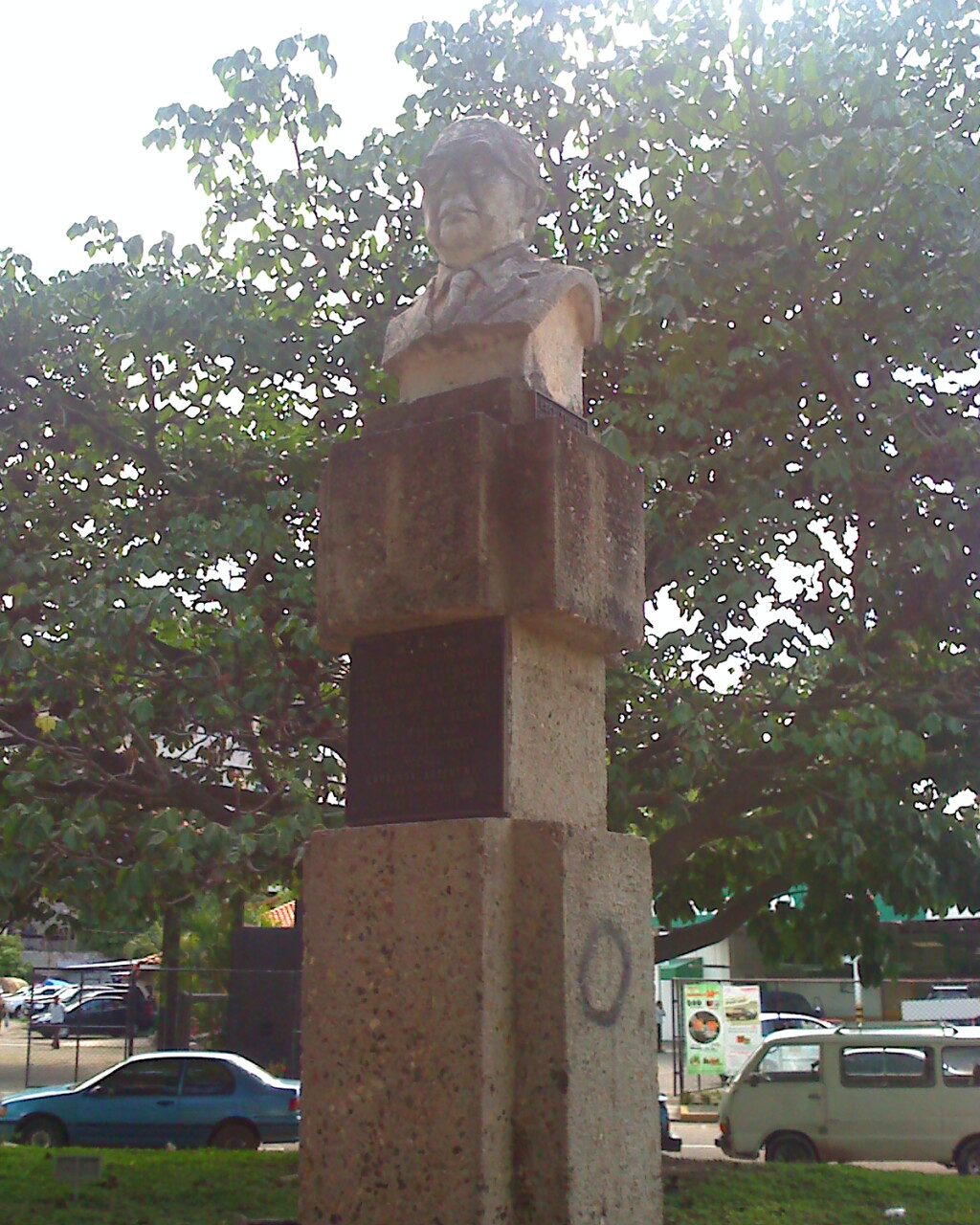 Estatua del pintor hondureño José Antonio Velasquez, situada en el Redondel de los Artesanos, a la par del Centro Cultural de España en Tegucigalpa